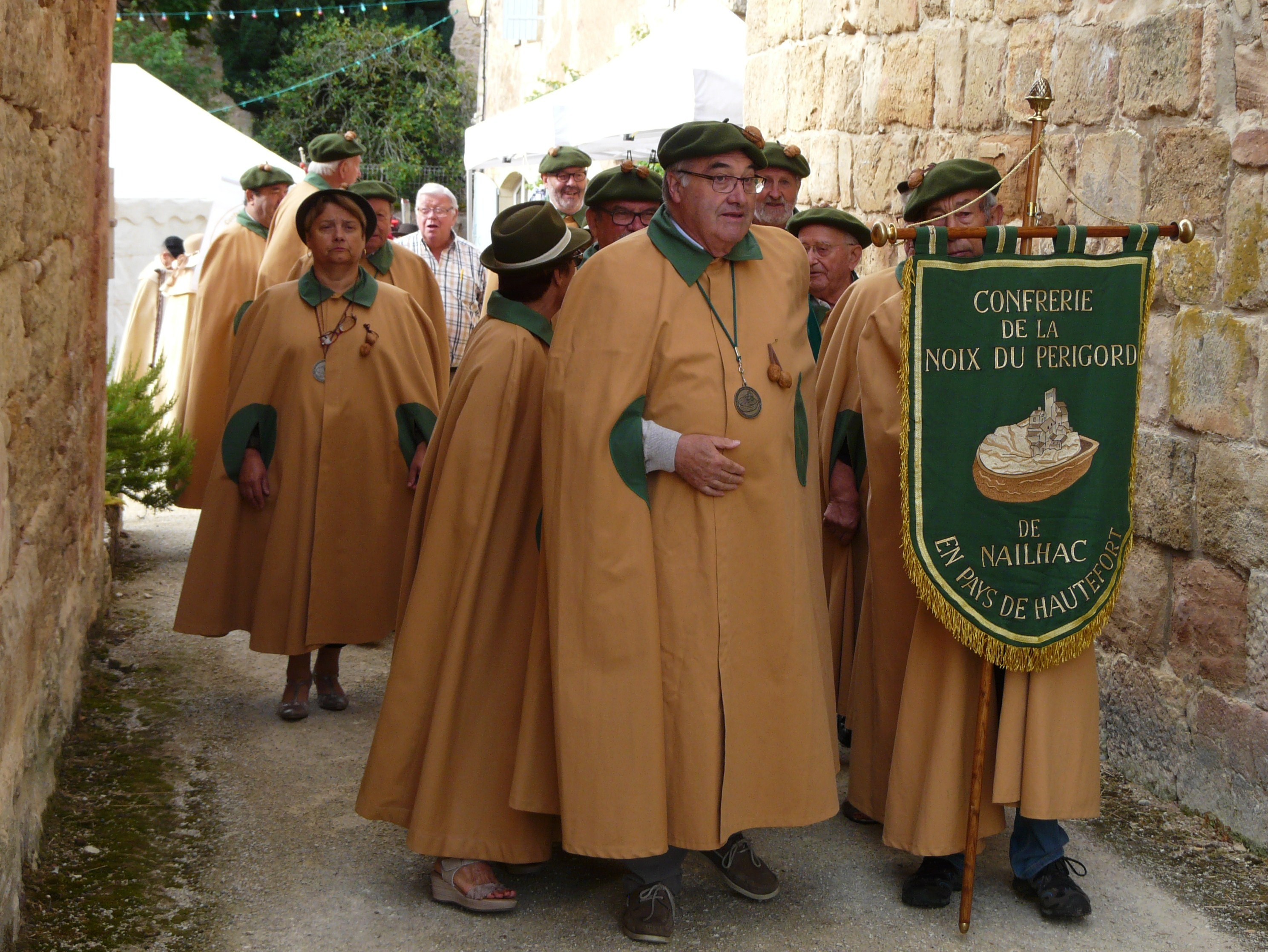 Le défilé des confréries, fête de la noix 2016, Nailhac, Dordogne, France.